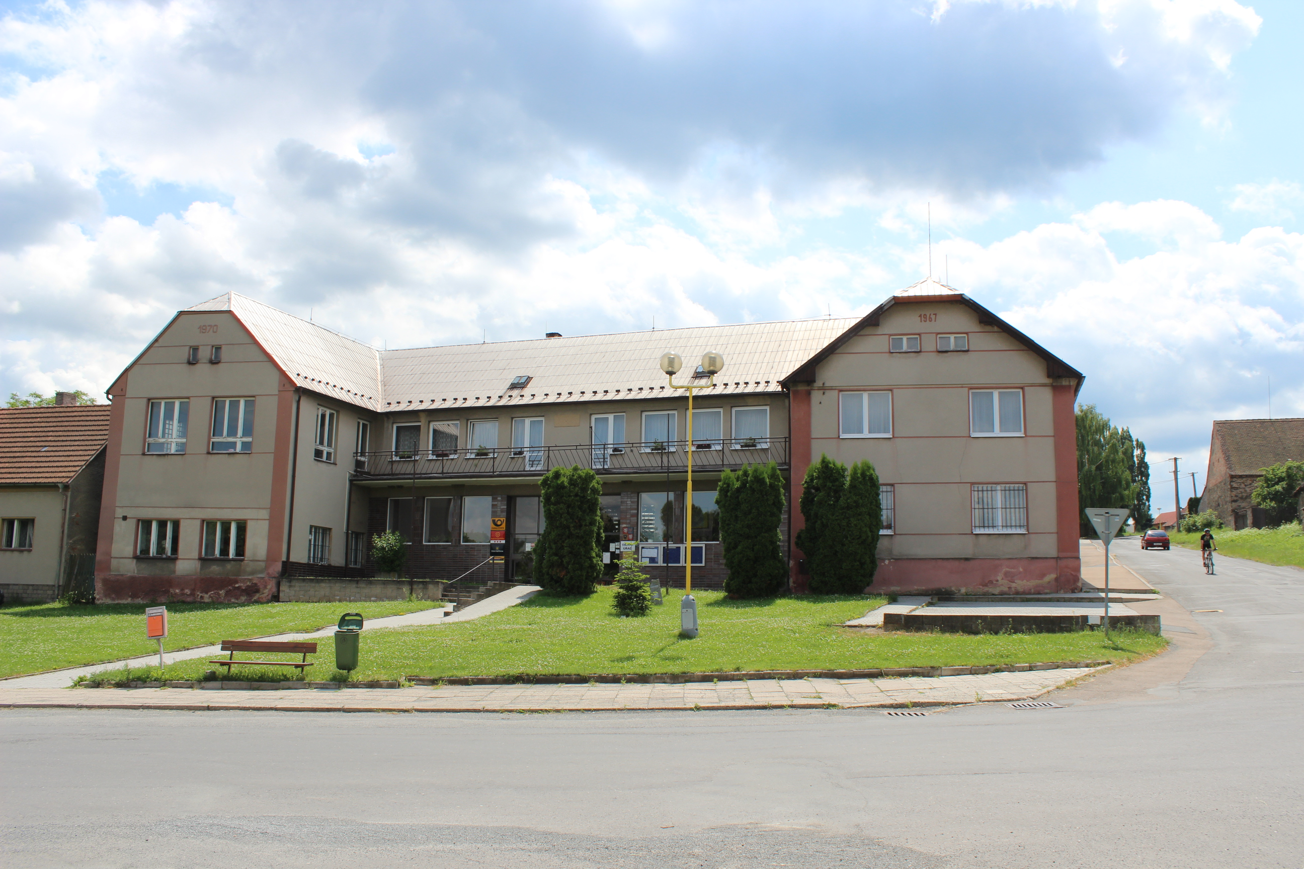 Obecní a poštovní úřad v Bratronicích v kladenském okrese.